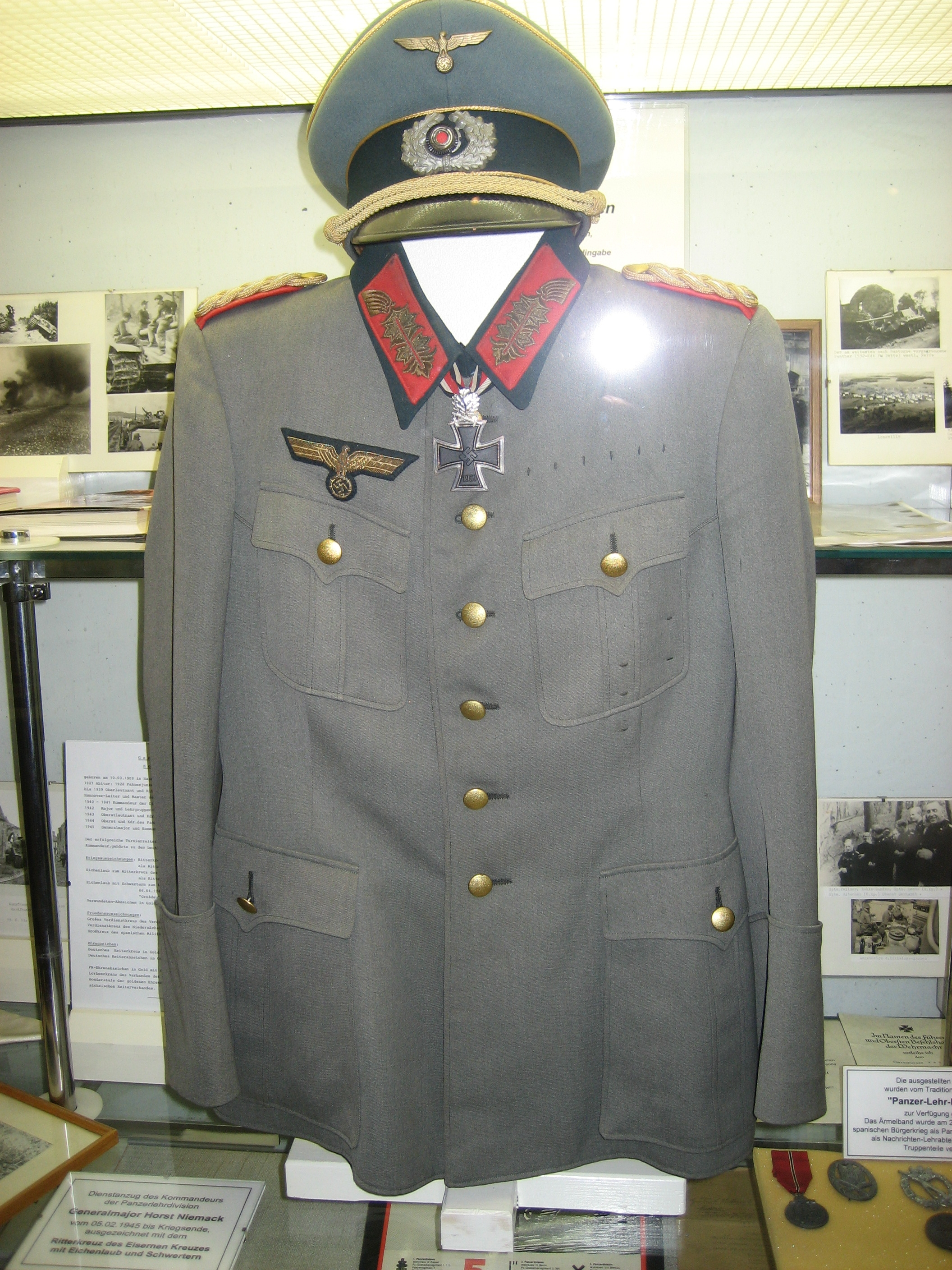 Horst Niemack's uniform in Deutsches Panzer Museum Munster